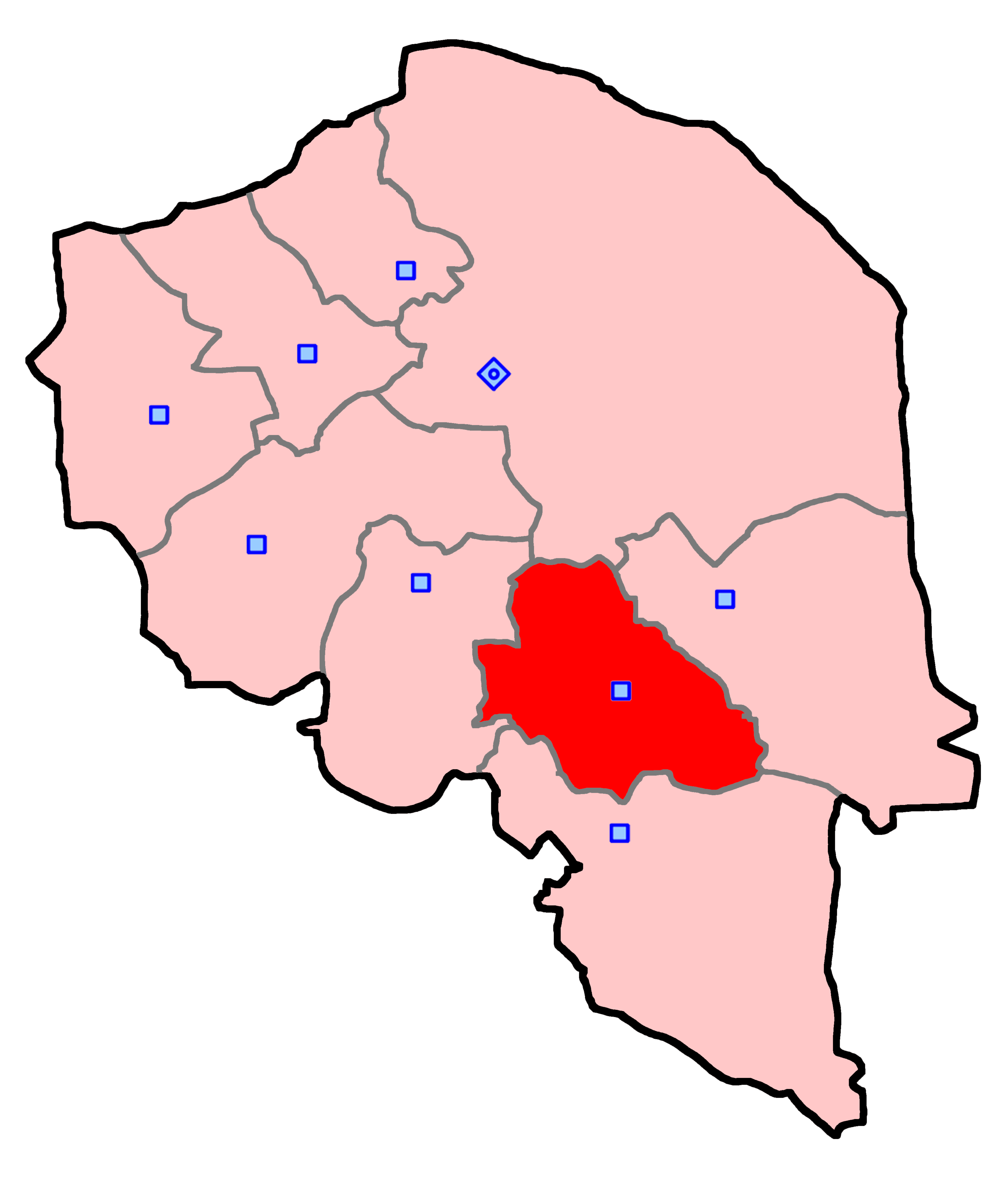 جیرفت و عنبرآباد برای انتخابات مجلس شورای اسلامی